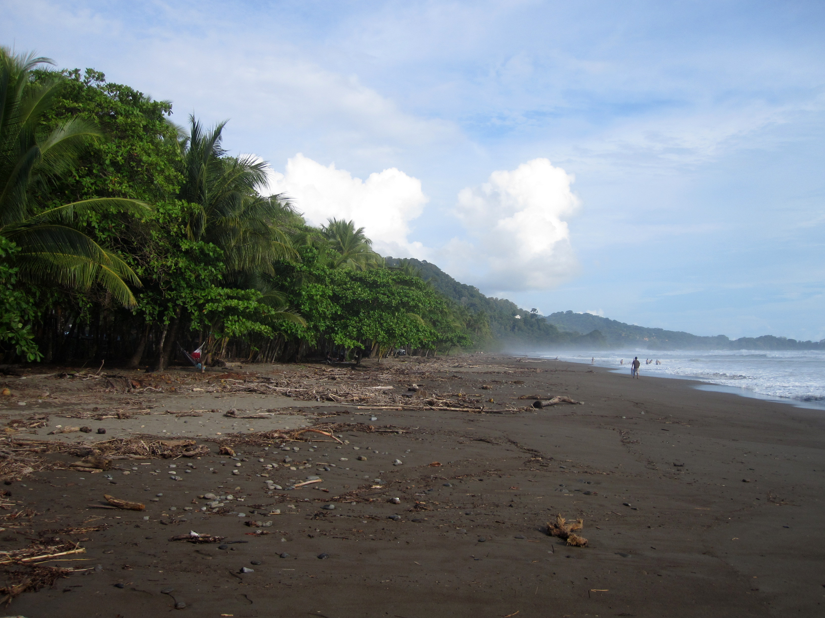 Playa Dominical i Costa Rica